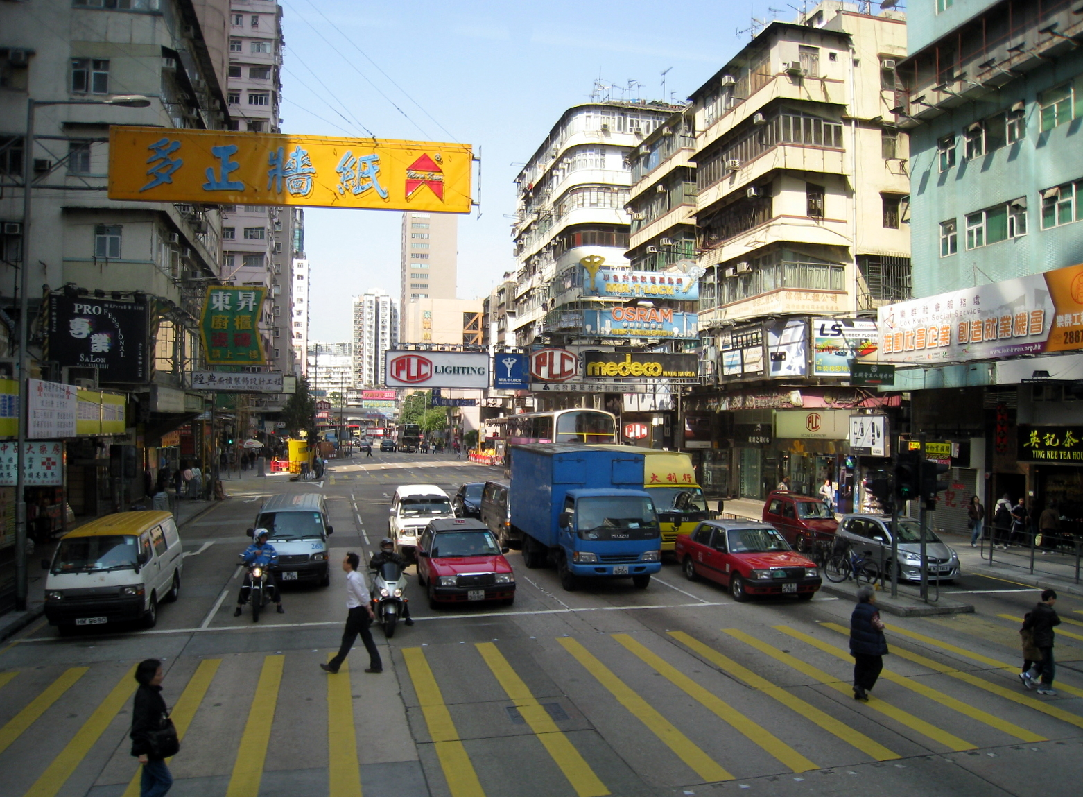 Mong Kok Road 旺角道